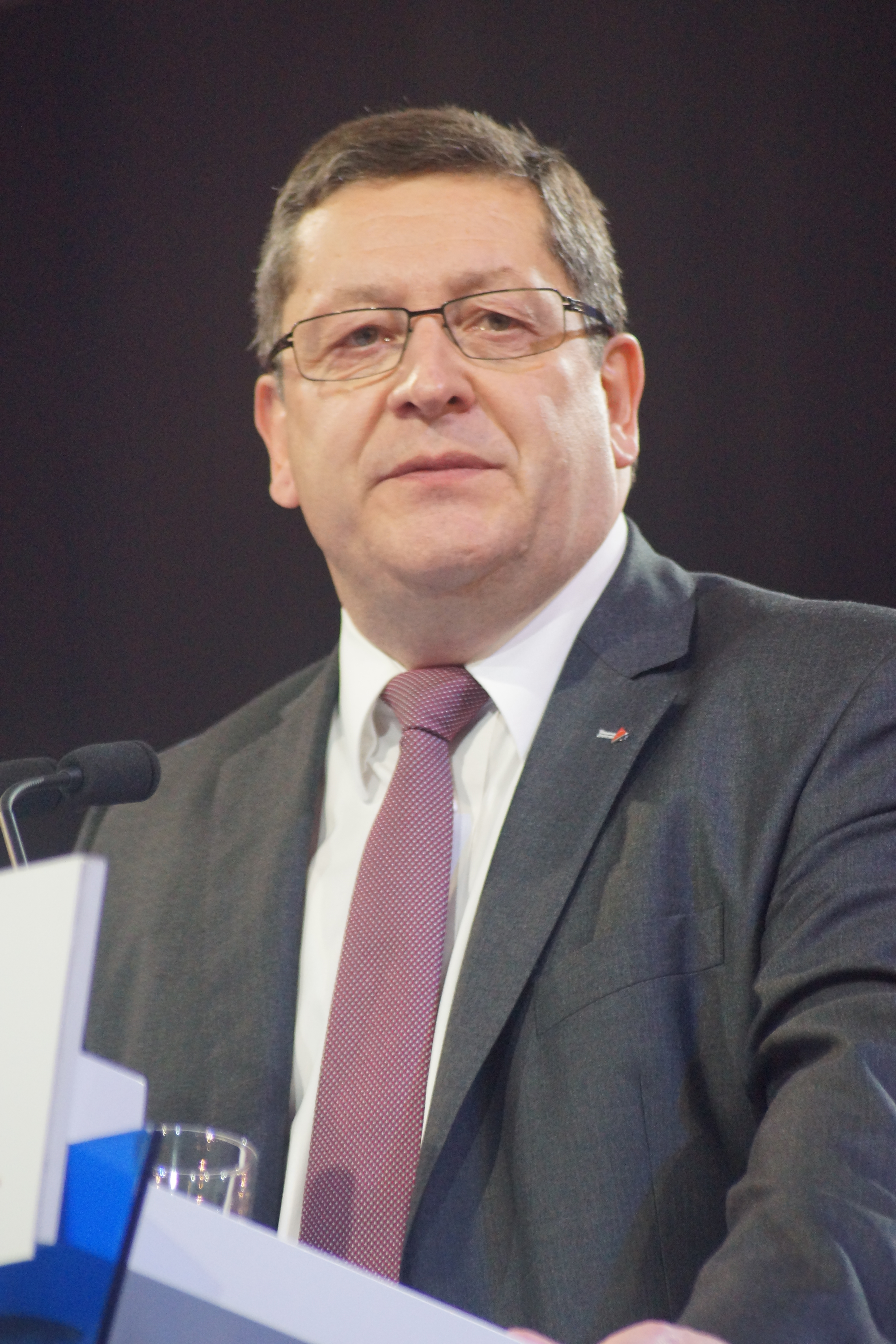 Thierry Giet, président du Parti Socialiste (Belgique)